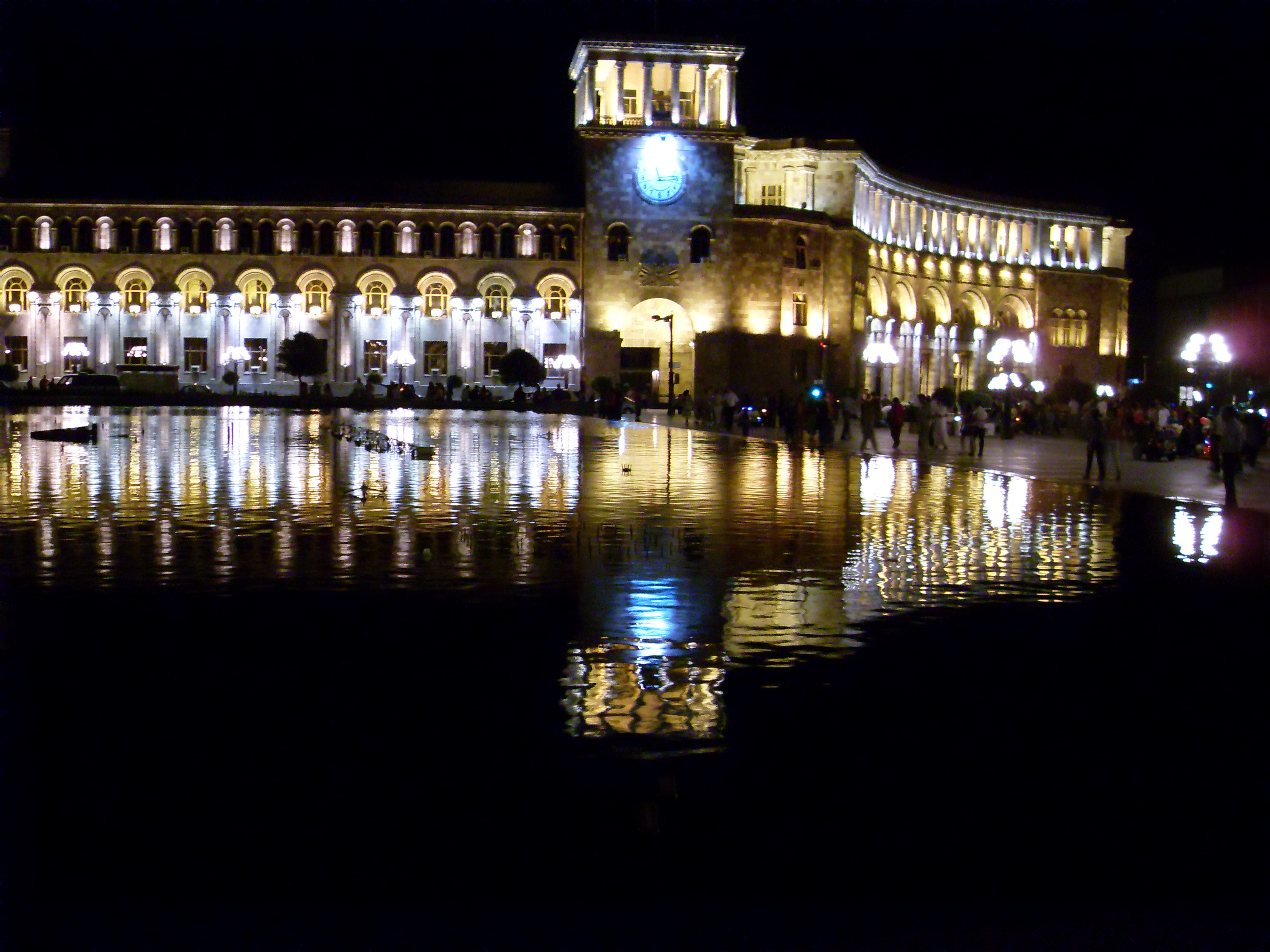 ՀՀ Կառավարական տունը գիշերով, ճարտ.` Ա. Թամանյան, Գ. Թամանյան, 1942 թ. 6/96.4